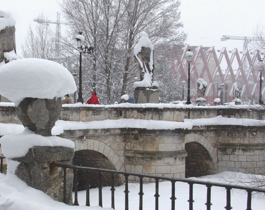 Puente San Pablo y obras Museo de la Evolución, nevada 2007, Burgos, España.